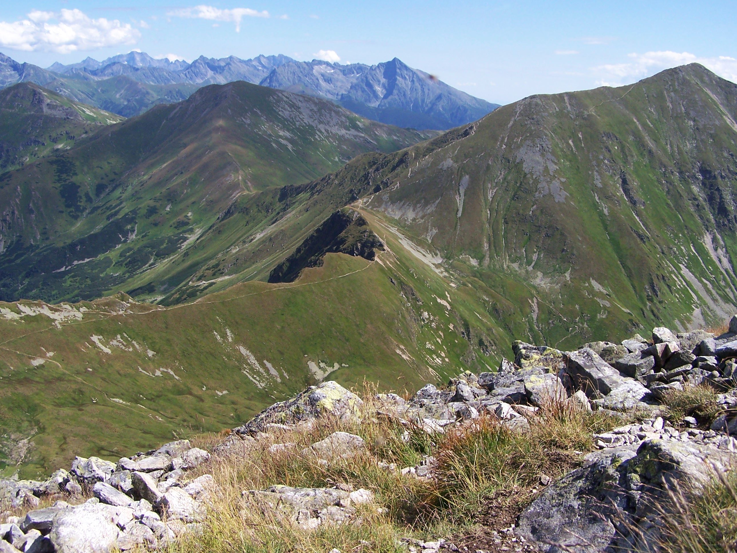 Błyszcz i Bystra (po prawej stronie). Na środku Kamienista.